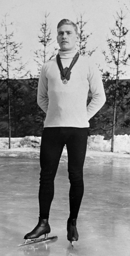 Julius Skutnabb